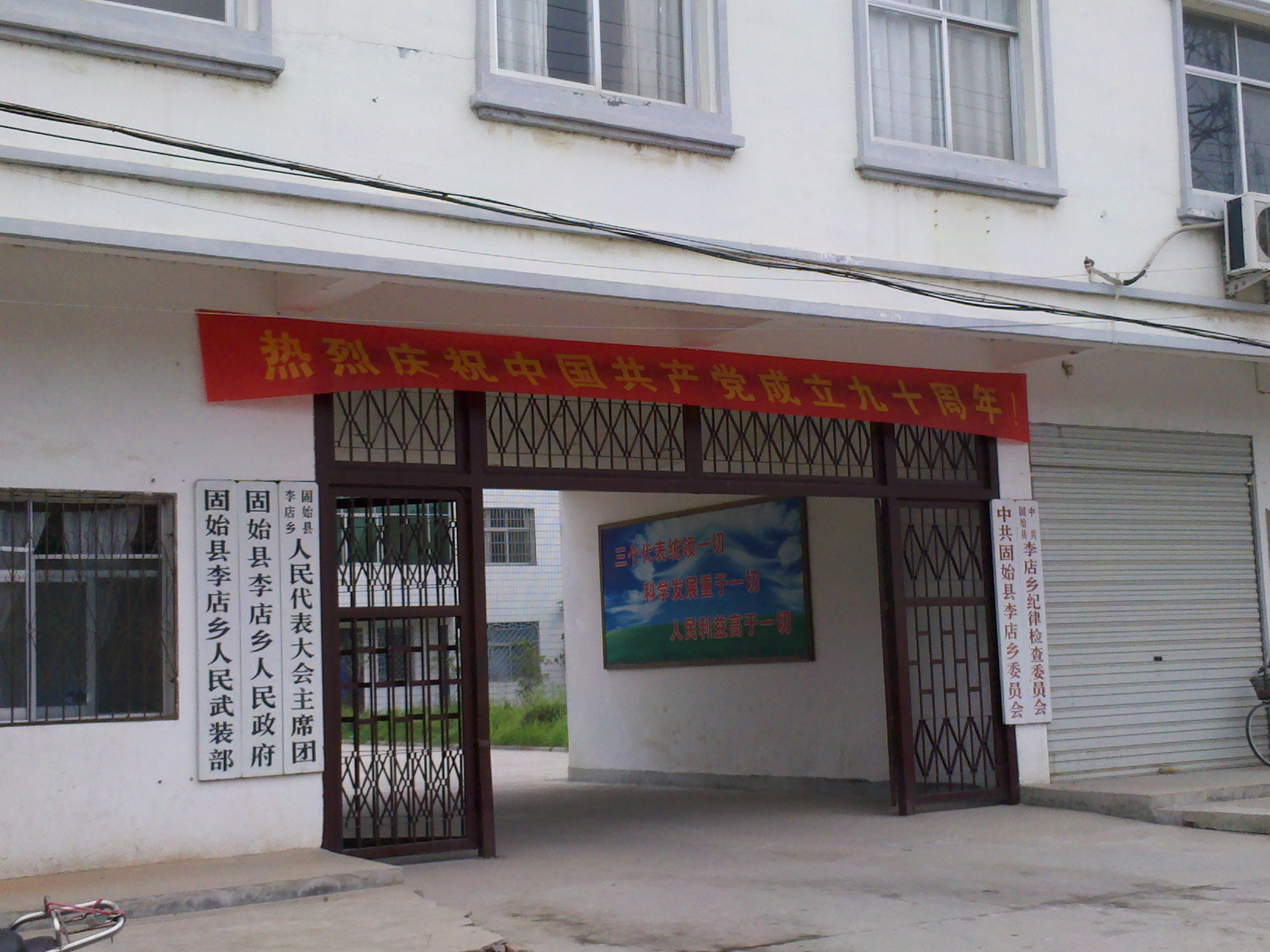 固始县李店乡人民政府